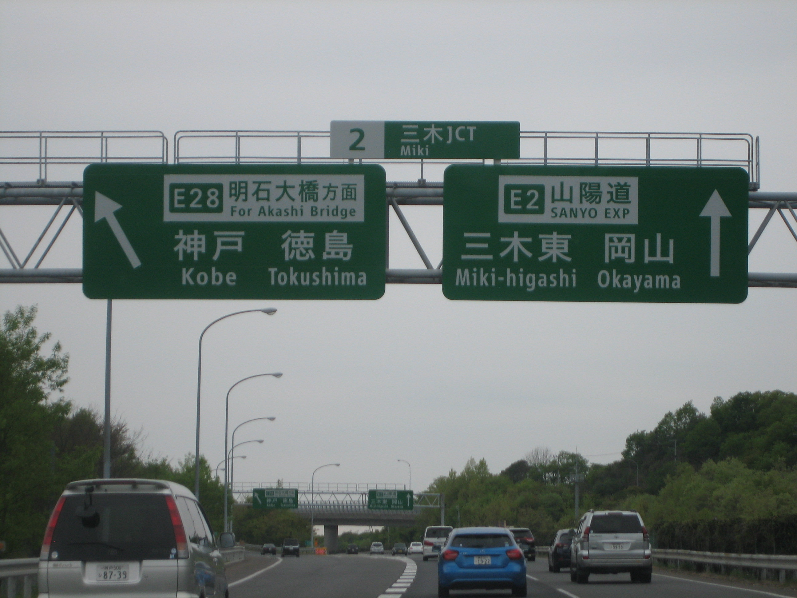 三木JCT